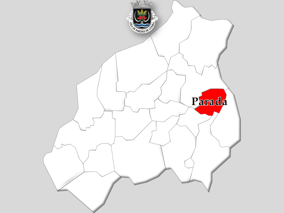 Censos 1864/2011